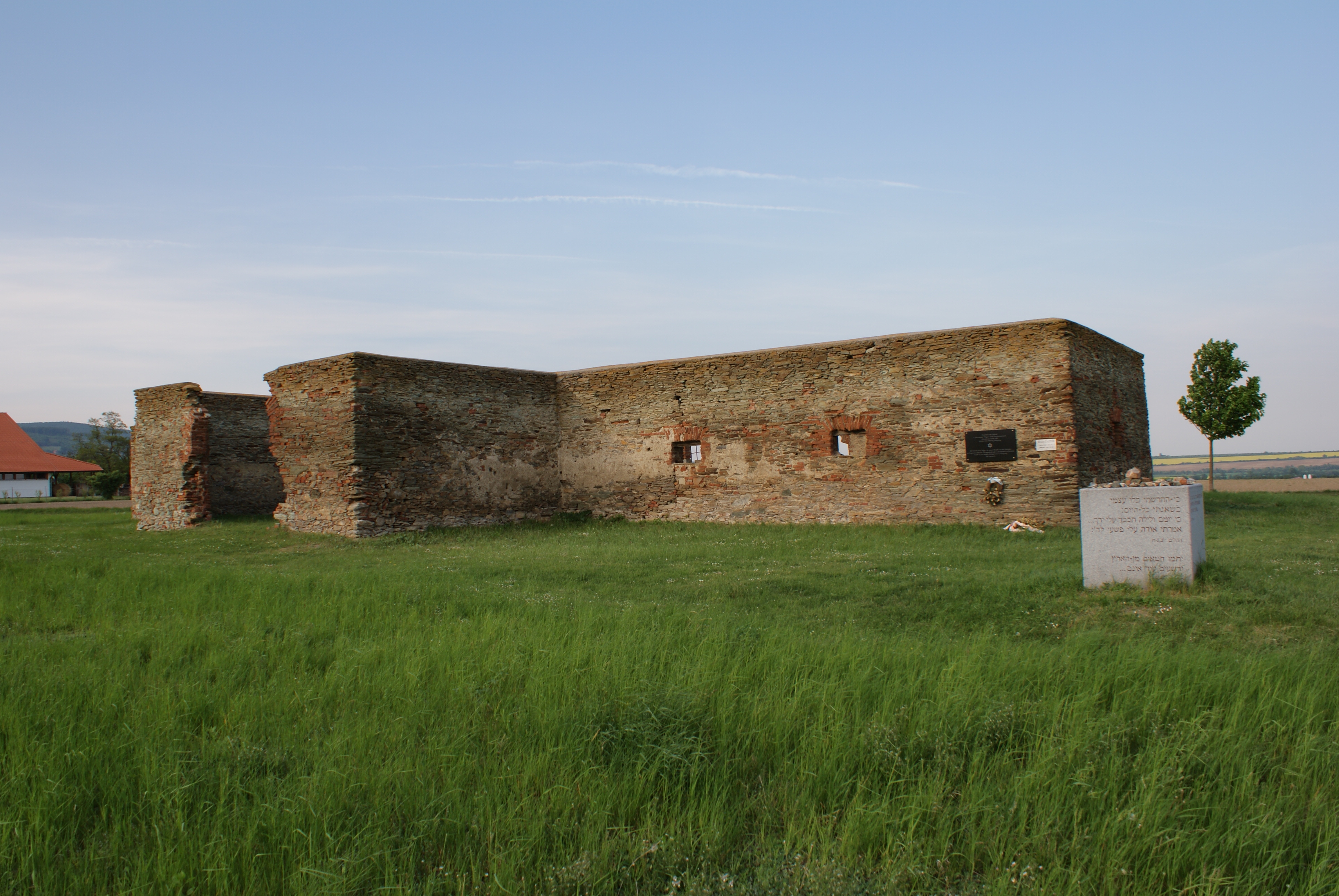 Kreuzstadl von Süden